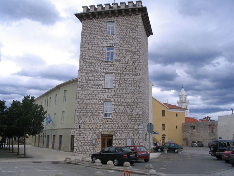 Kaštel Frankopan, u kojemu je 1288. napisan Vinodolski zakon. Lijevo je Trg Vinodolskog zakona, a desno Frankopanski trg